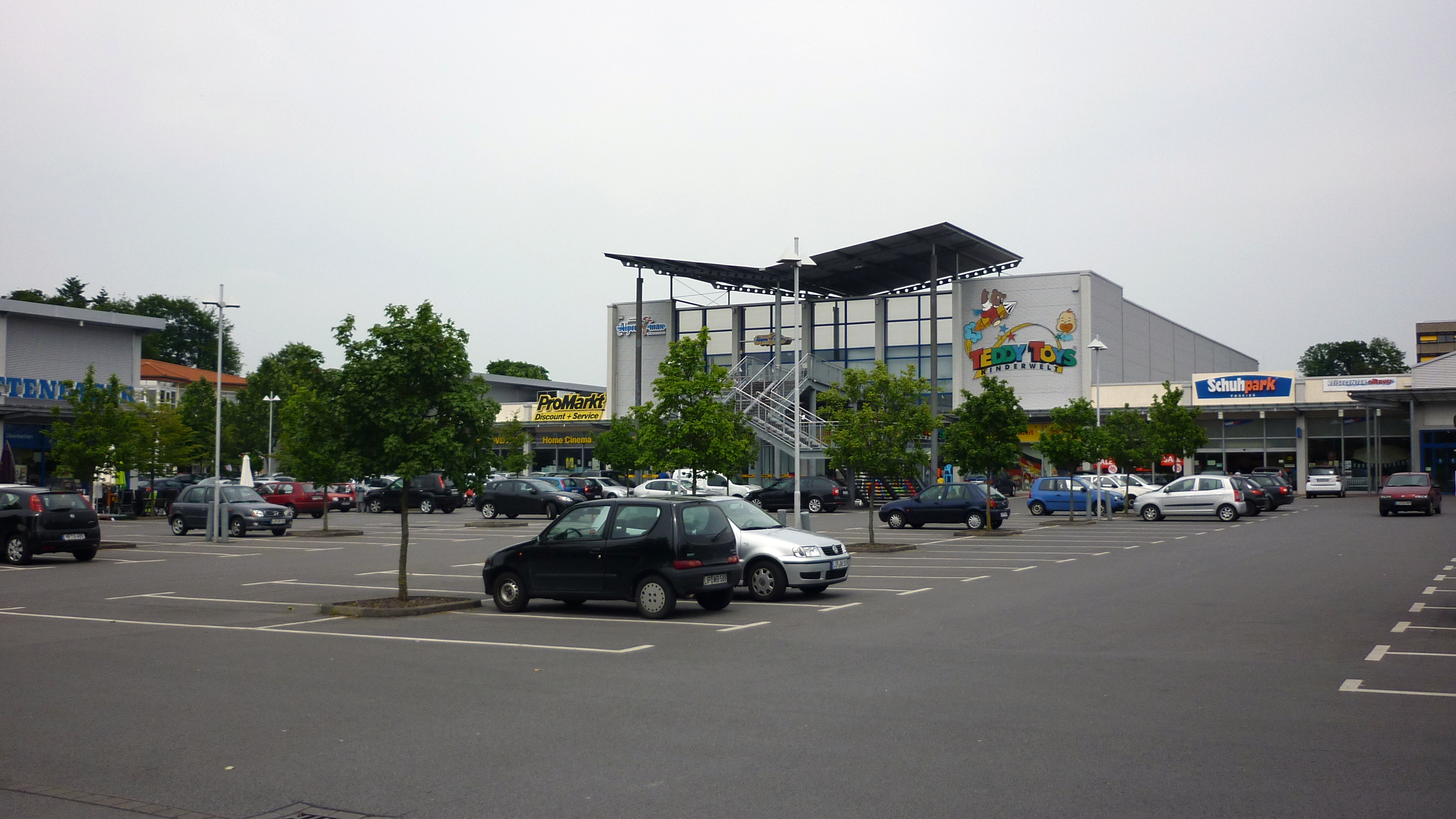 Bad Salzuflen. Offenes Einkaufszentrum auf dem Gelände der ehemaligen "Hoffmann’s Stärkefabriken" an der Hoffmannstraße.